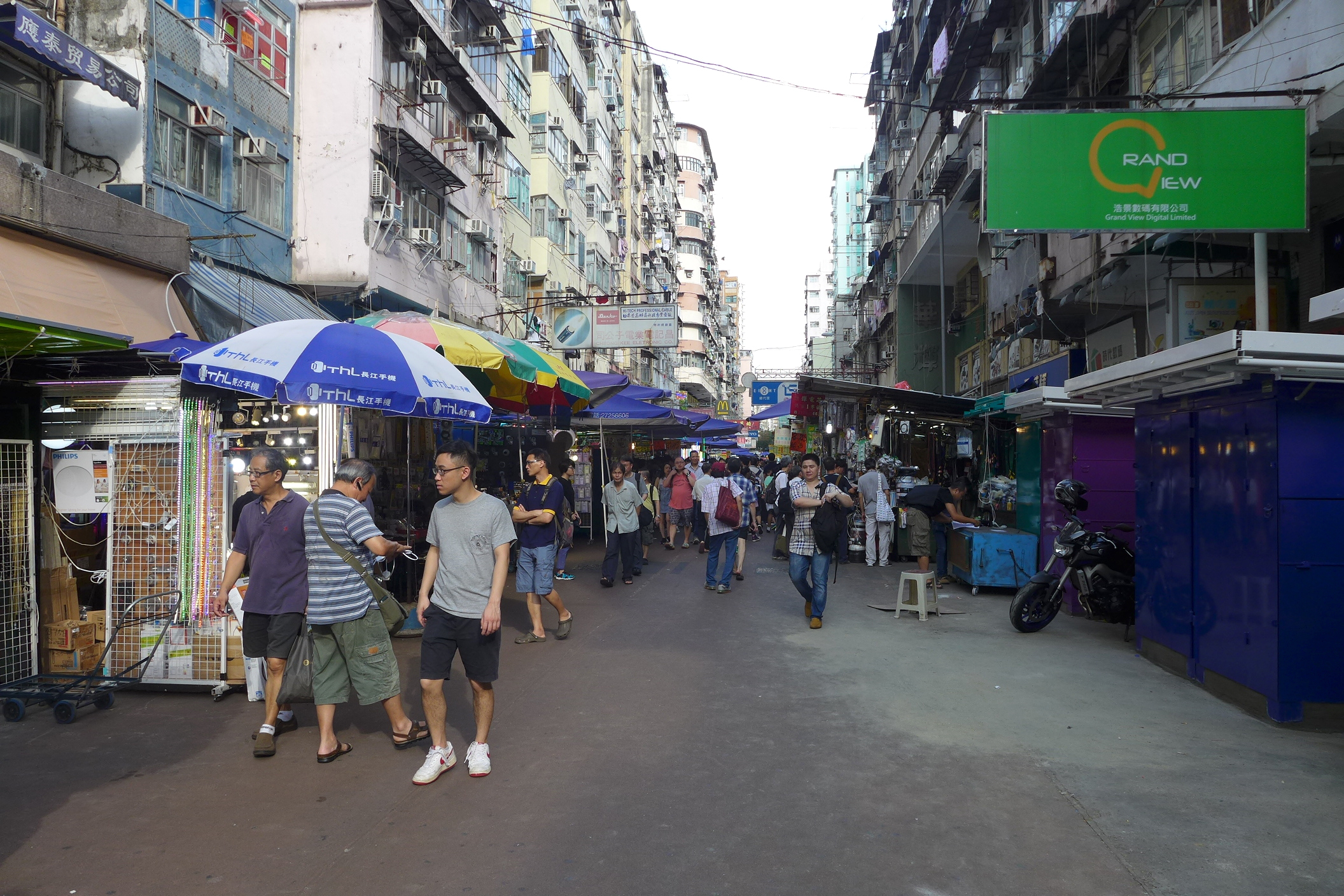 Apliu Street